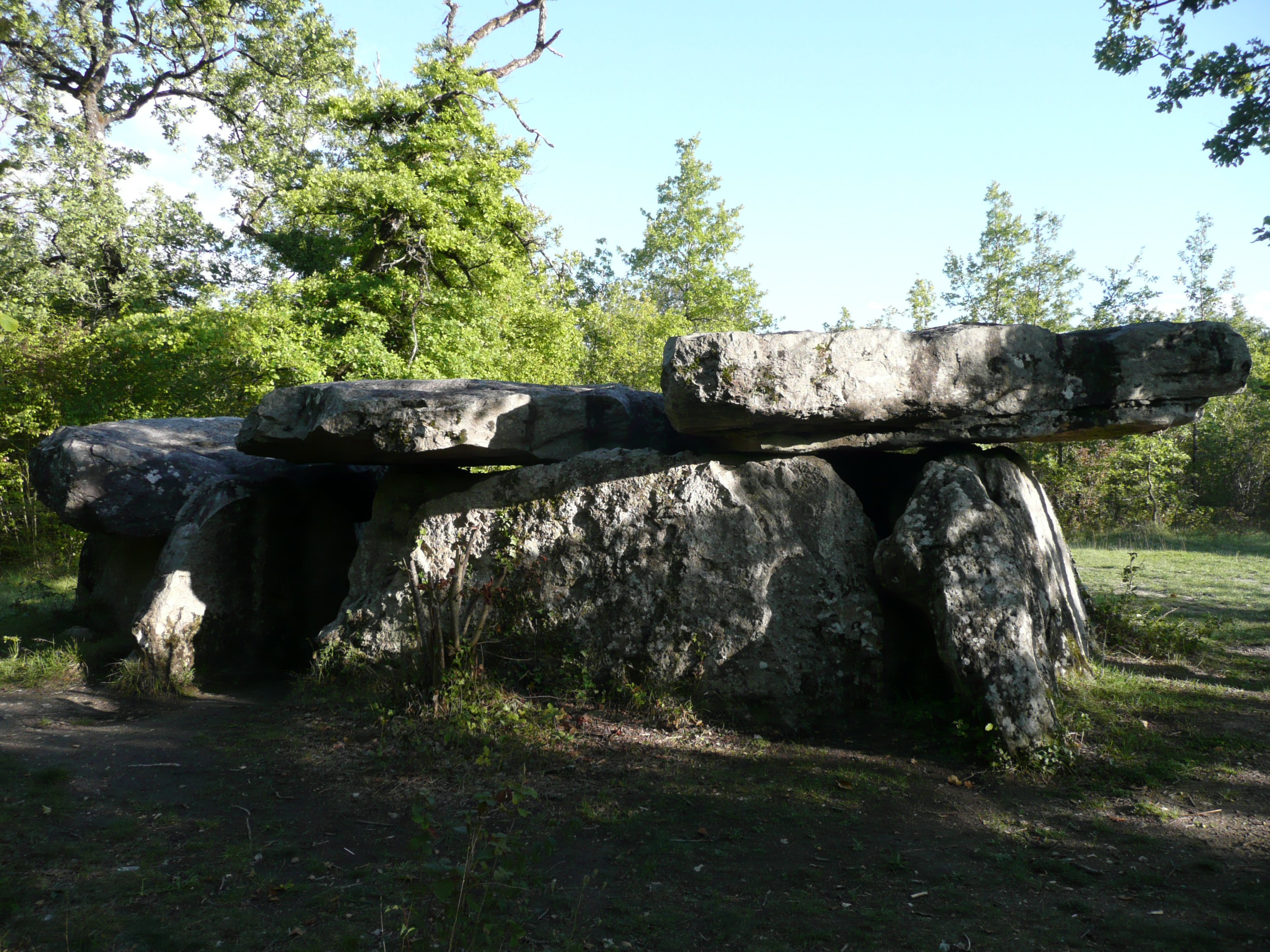 Pontigné - Dolmen .